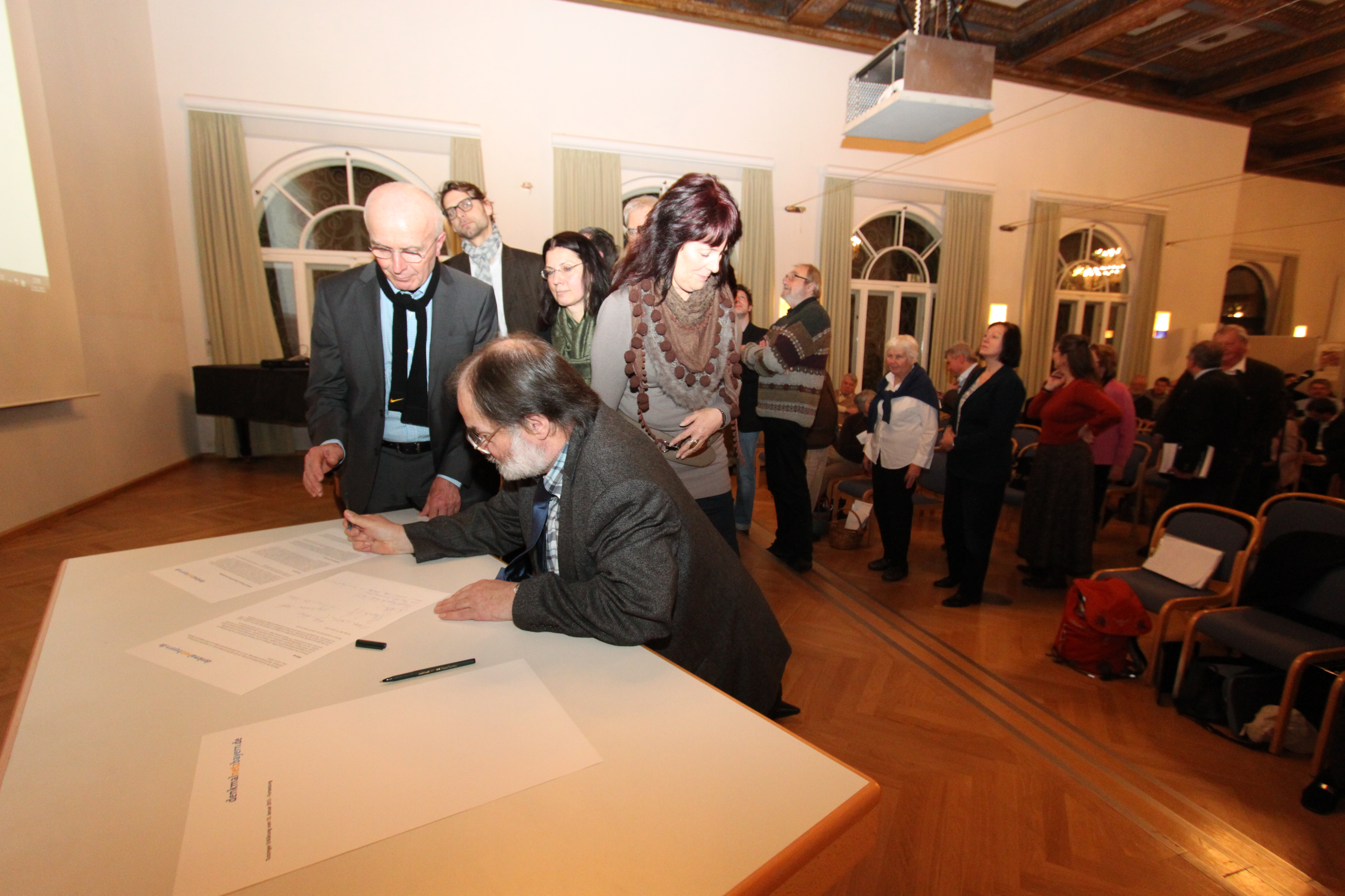 Erstunterzeichner des Denkmalnetzes Bayern